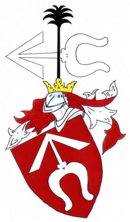 Erb Benešovců - pánů z Dubé